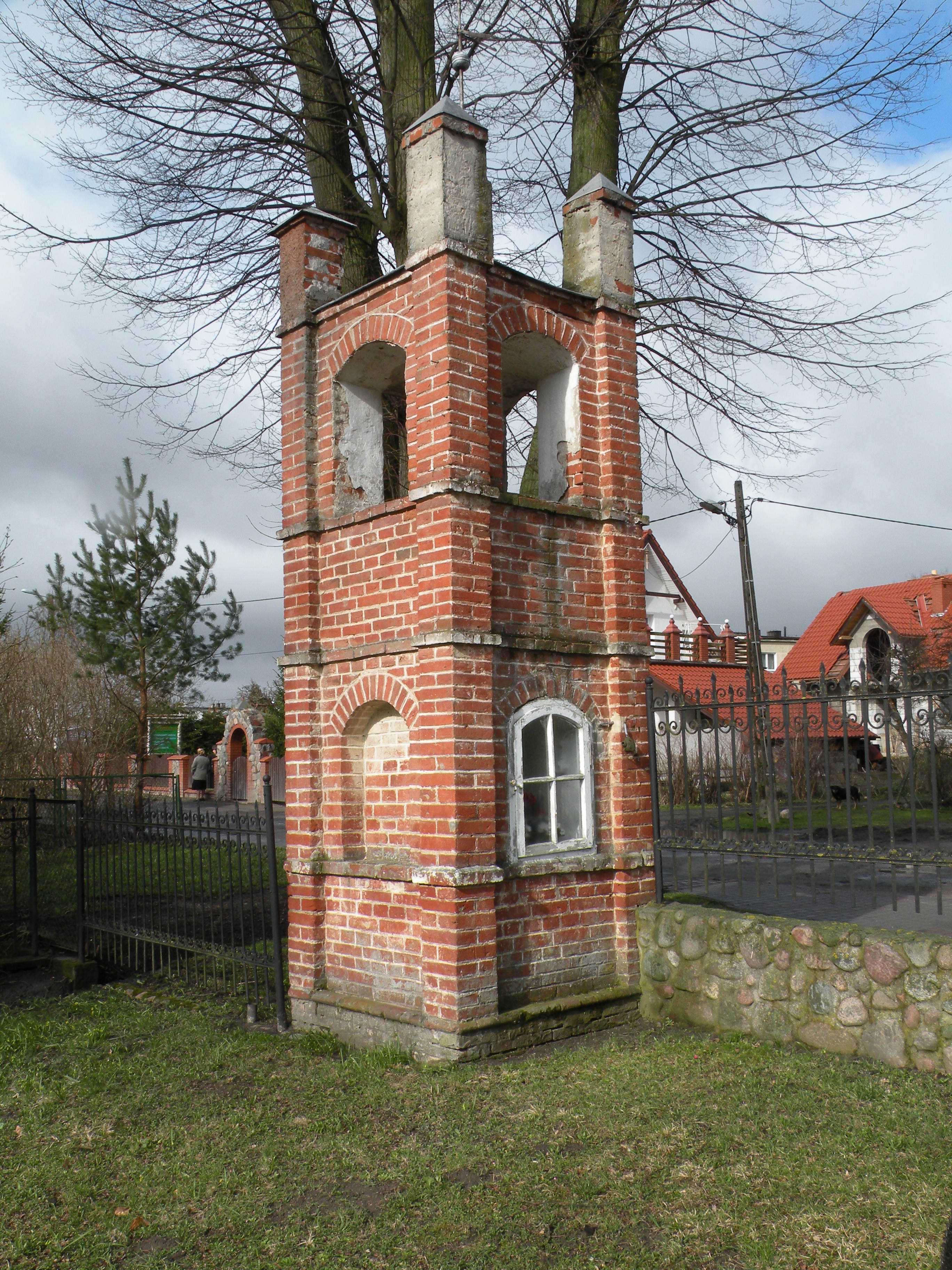 Klewki - kapliczka na cmentarzu przykościelnym